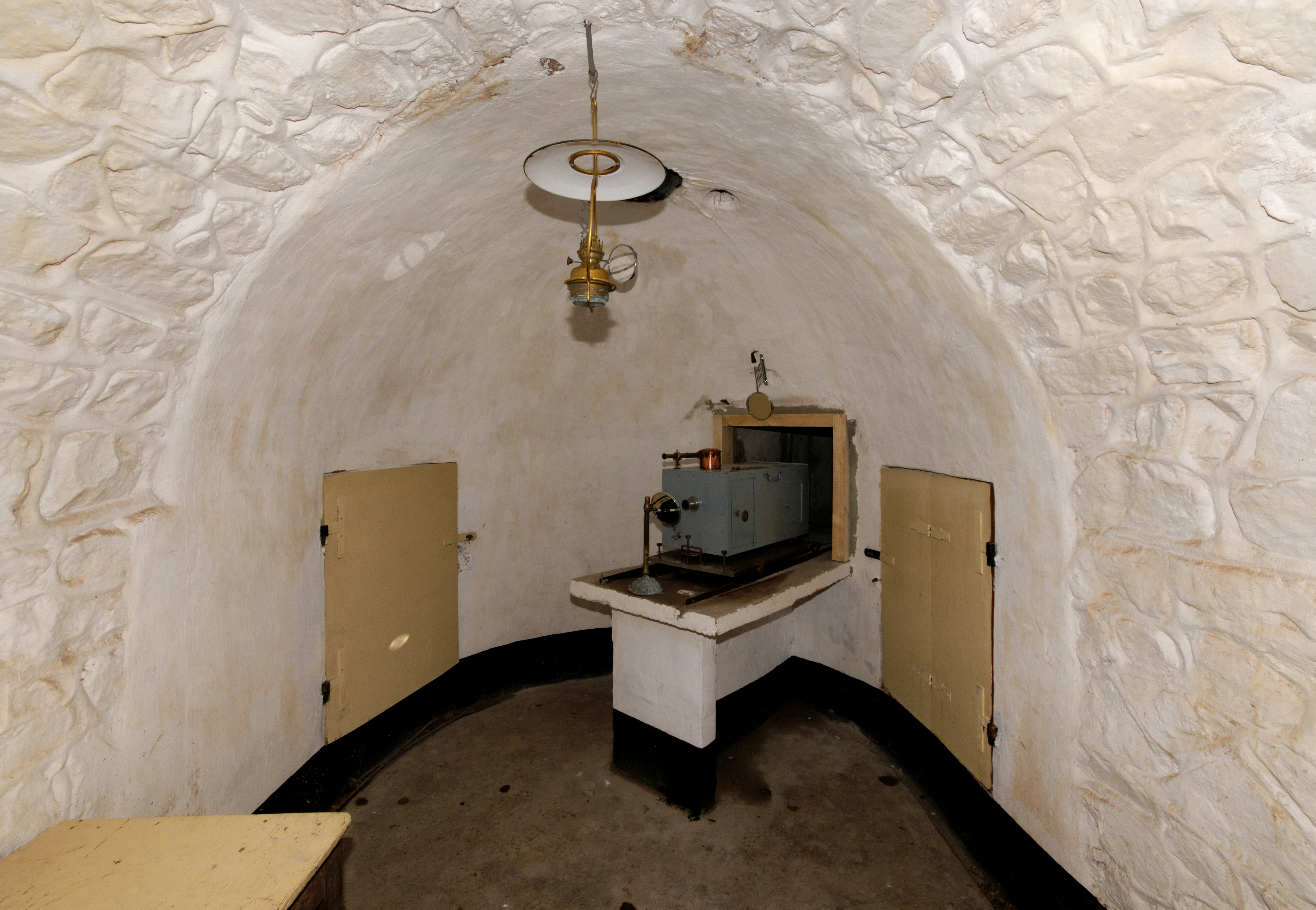 This photograph was taken with a Nikon D300 Fort du Parmont : détail du système de communication optique, dans le poste optique.